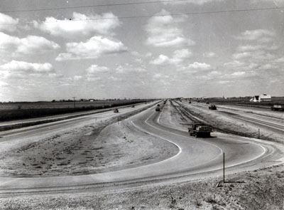 Testverkehr auf einer der Rundkurse des AASHO Road Test